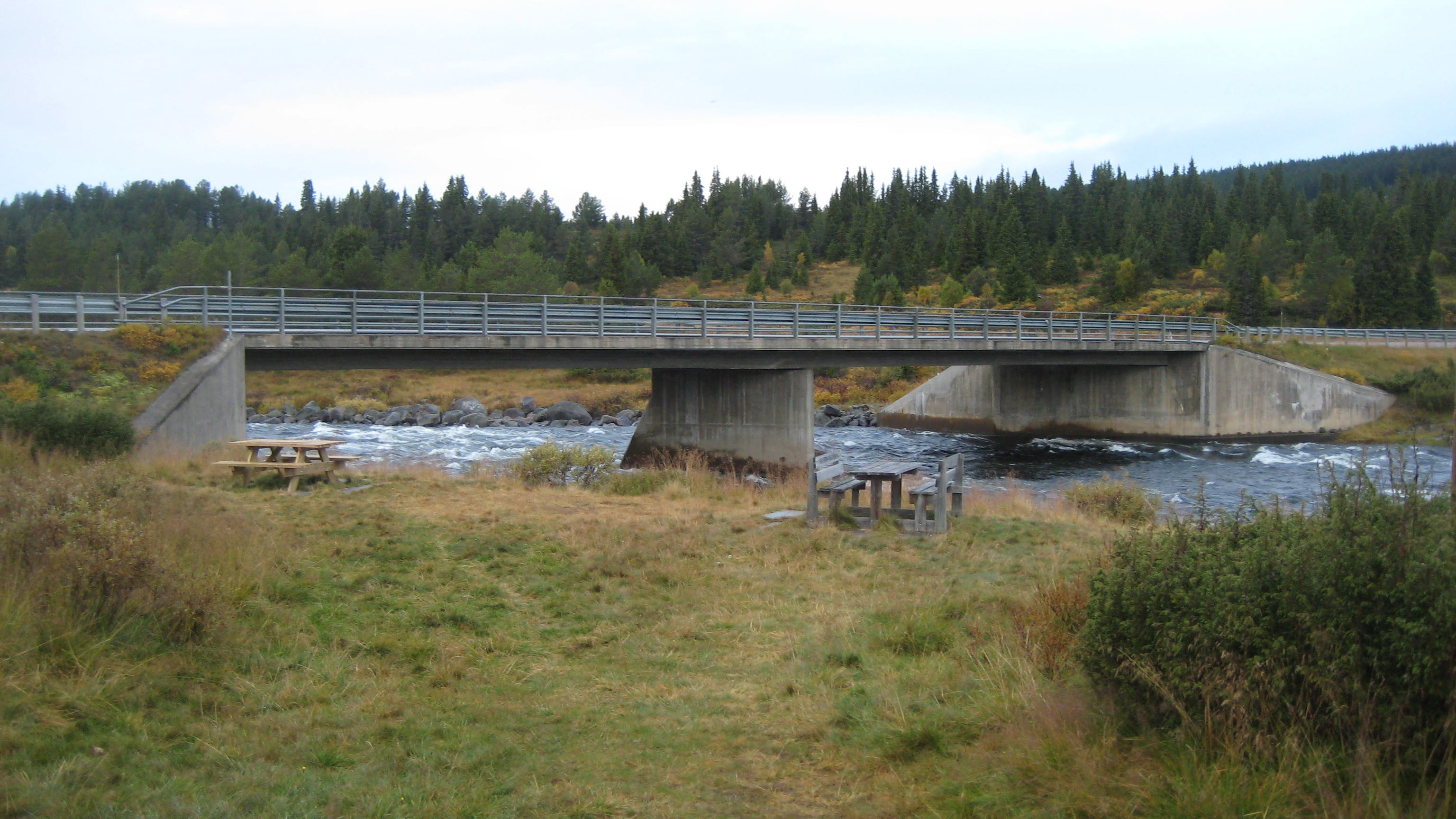 Nye Ormhamar bru, Tisleidalen